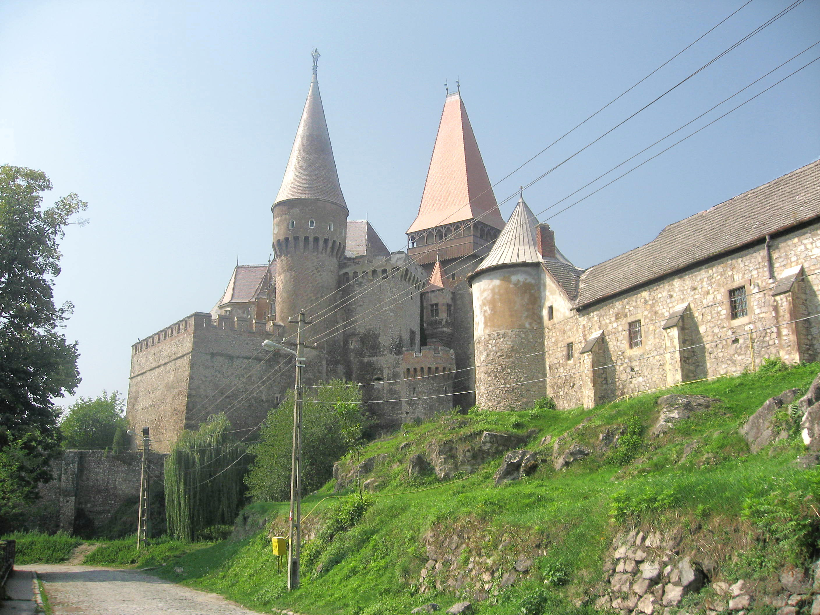 Hrad Hunedoara